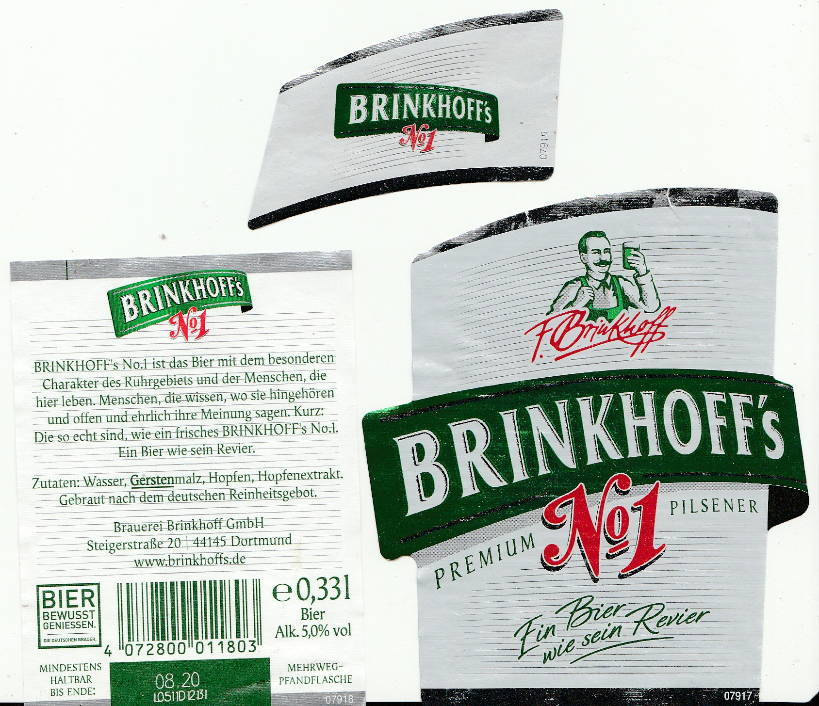 Ein Etikett der Brauerei Brinkhoff GmbH, Brinkhoff's No1, im Uhrzeigersinn: Hals, Vorderseite, Rückseite, von 2019.